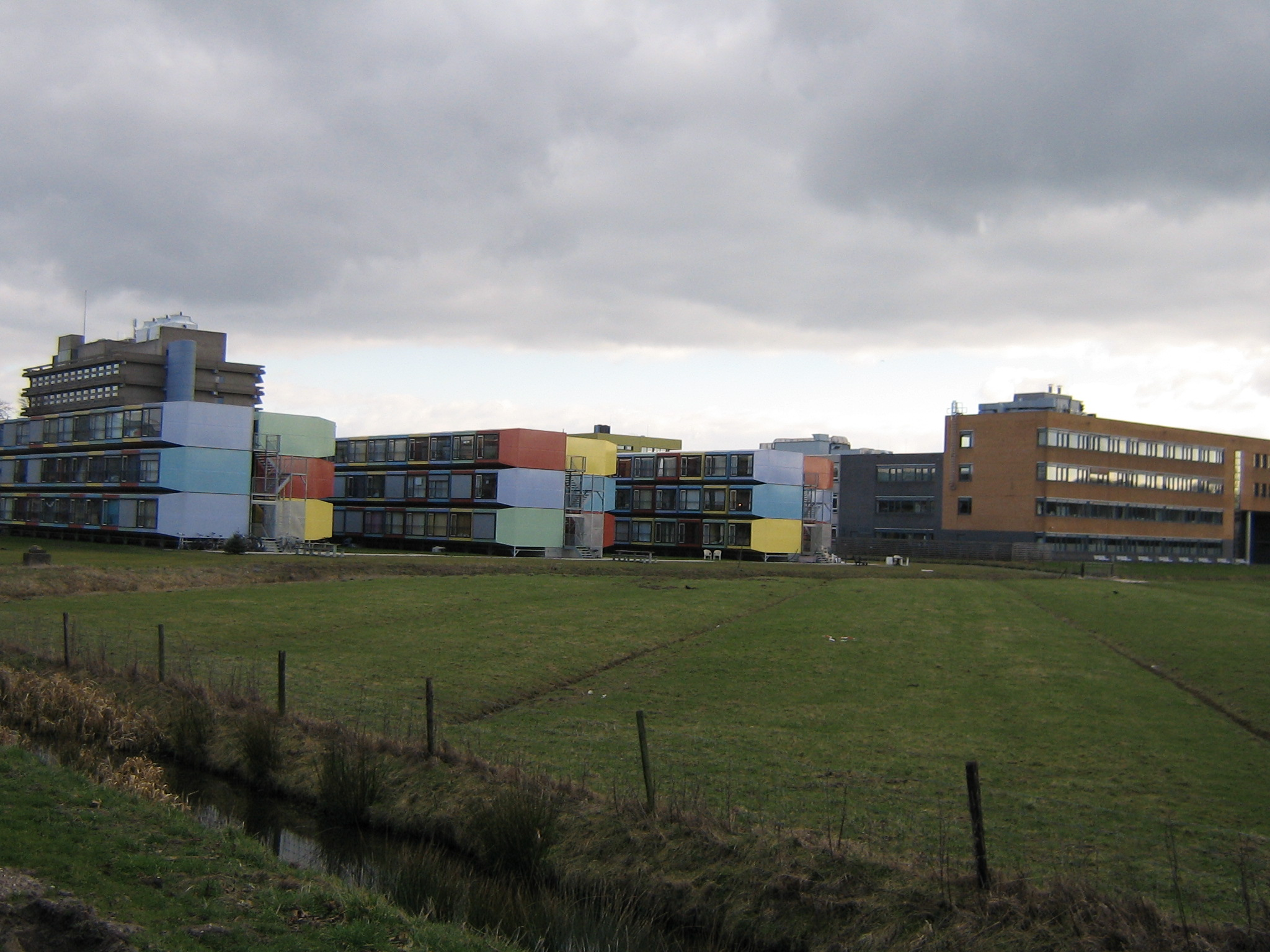 Studentenwoningen op de Uithof, Utrecht. Student housings in Utrecht, Netherlands.